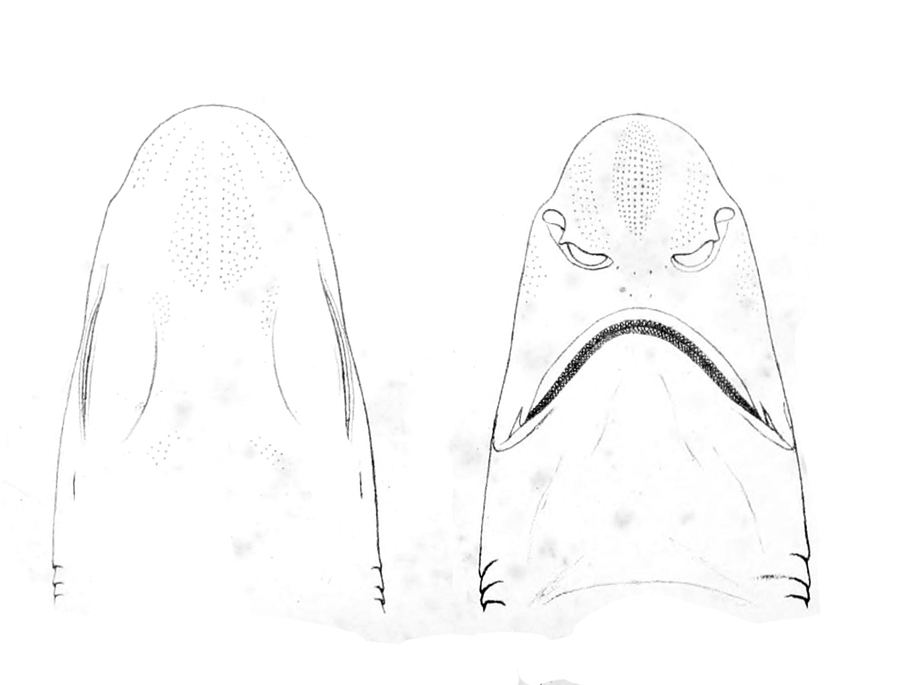 Galeus atlanticus